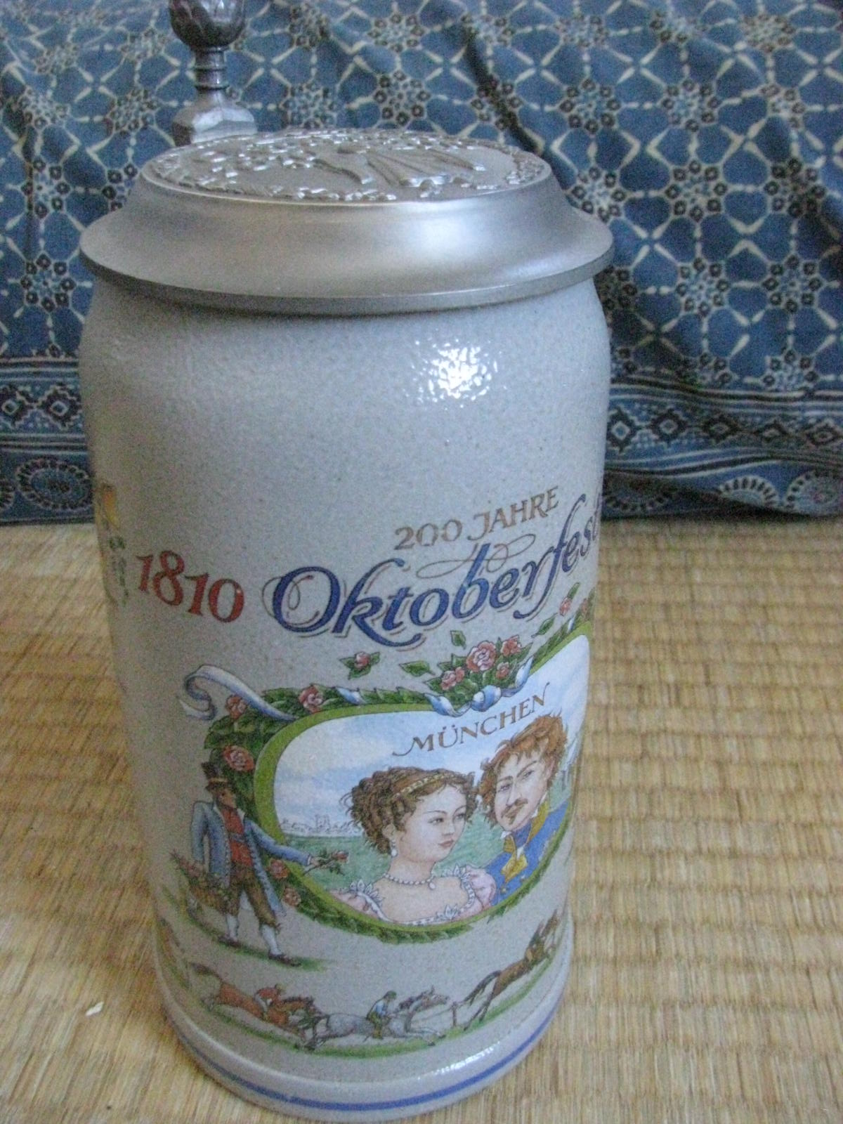 chope du jubilé de l'oktoberfest.